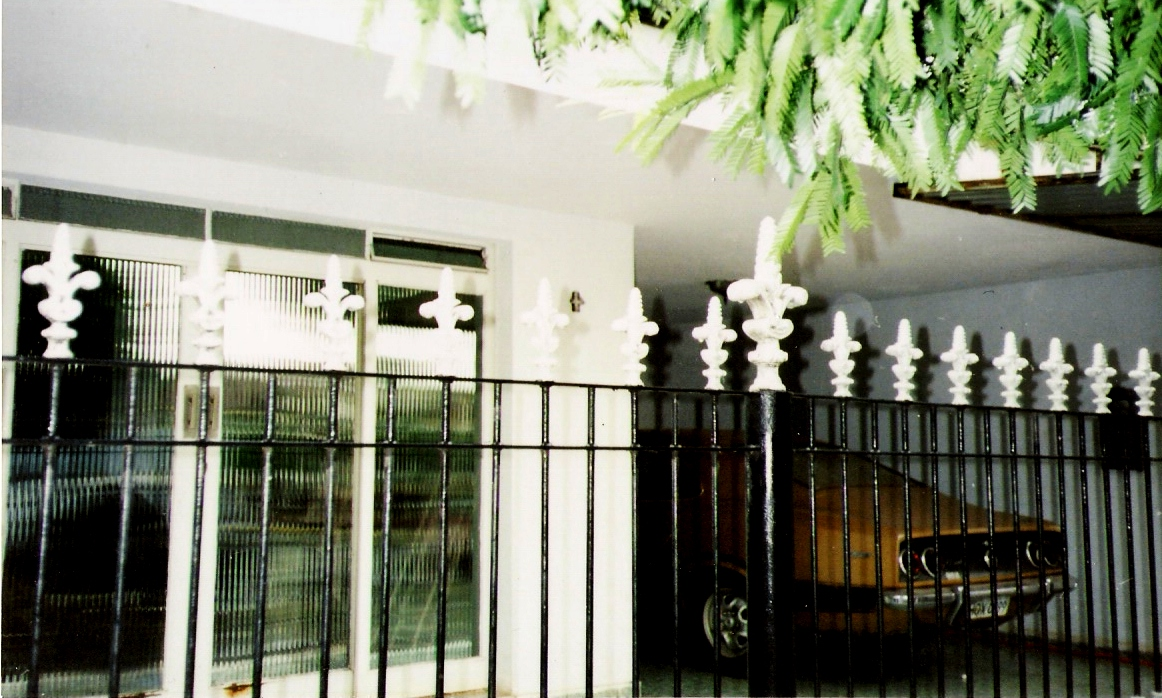 Descrição: Detalhes da residência de Hugo José Fernandes, em Três Lagoas, Mato Grosso do Sul, Brasil. 2001.